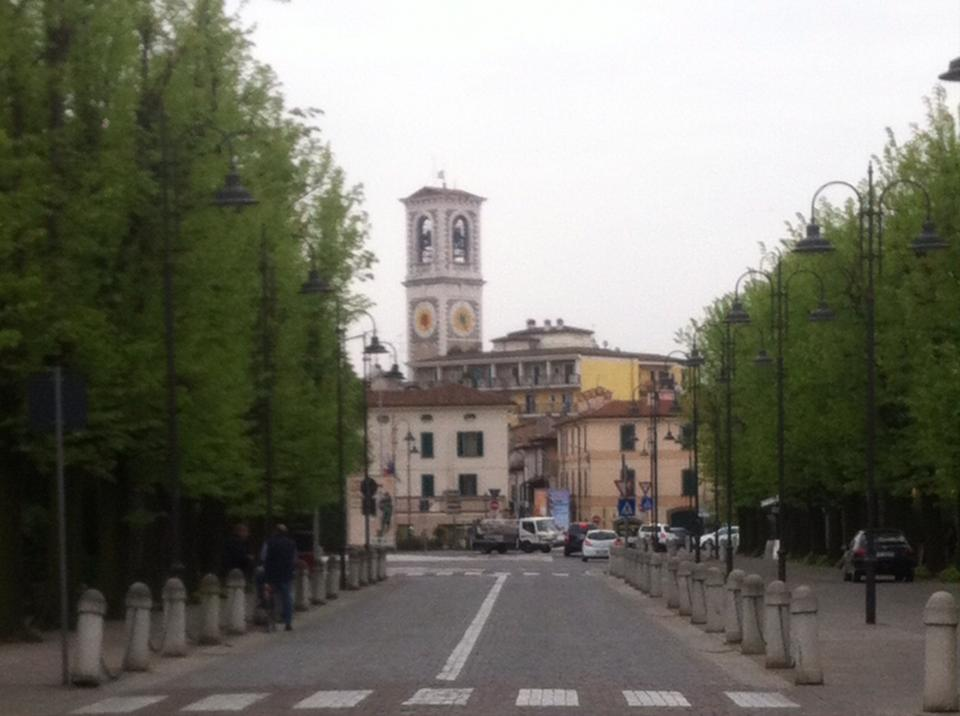 Torre Civica di Chiari dalla stazione